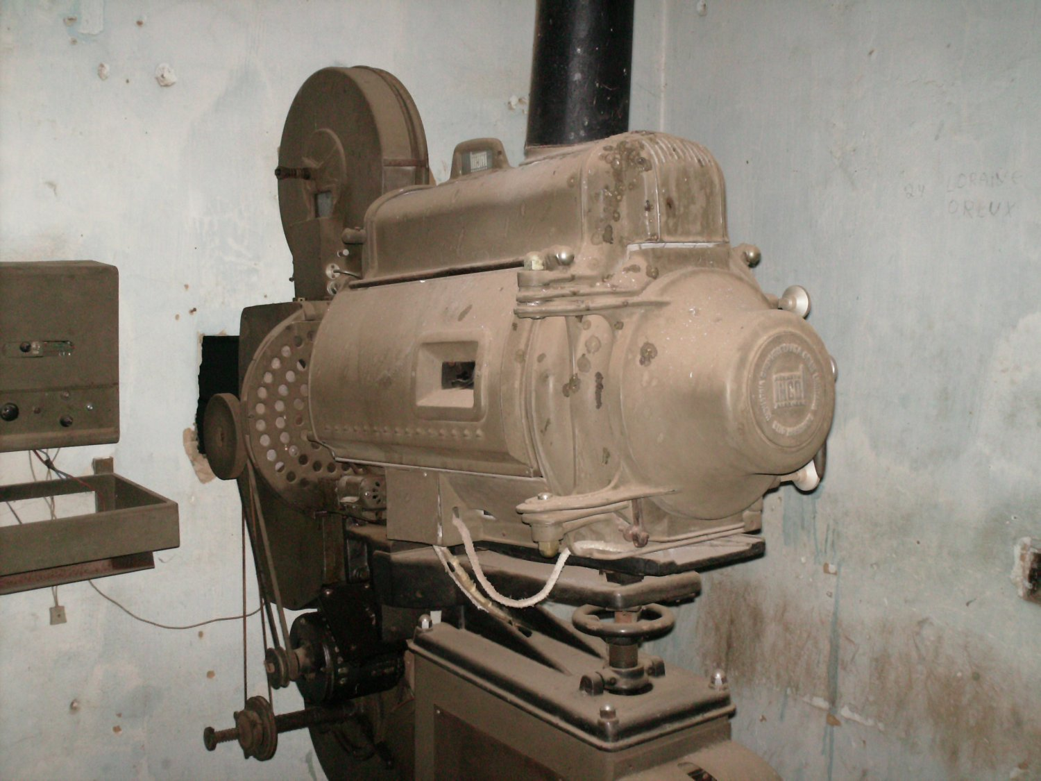 Old movie projector